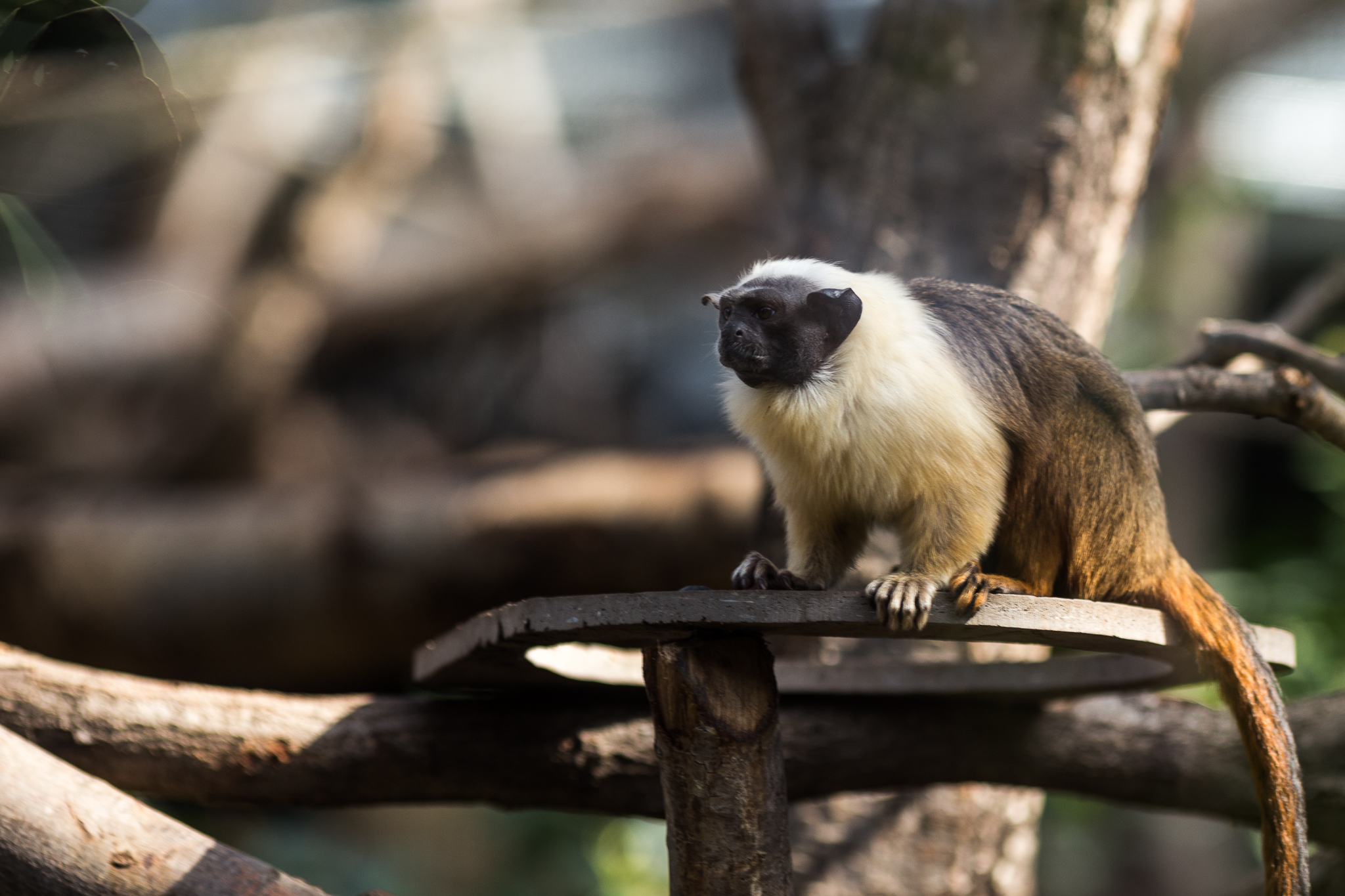 Parc Zoologique de Paris, France.